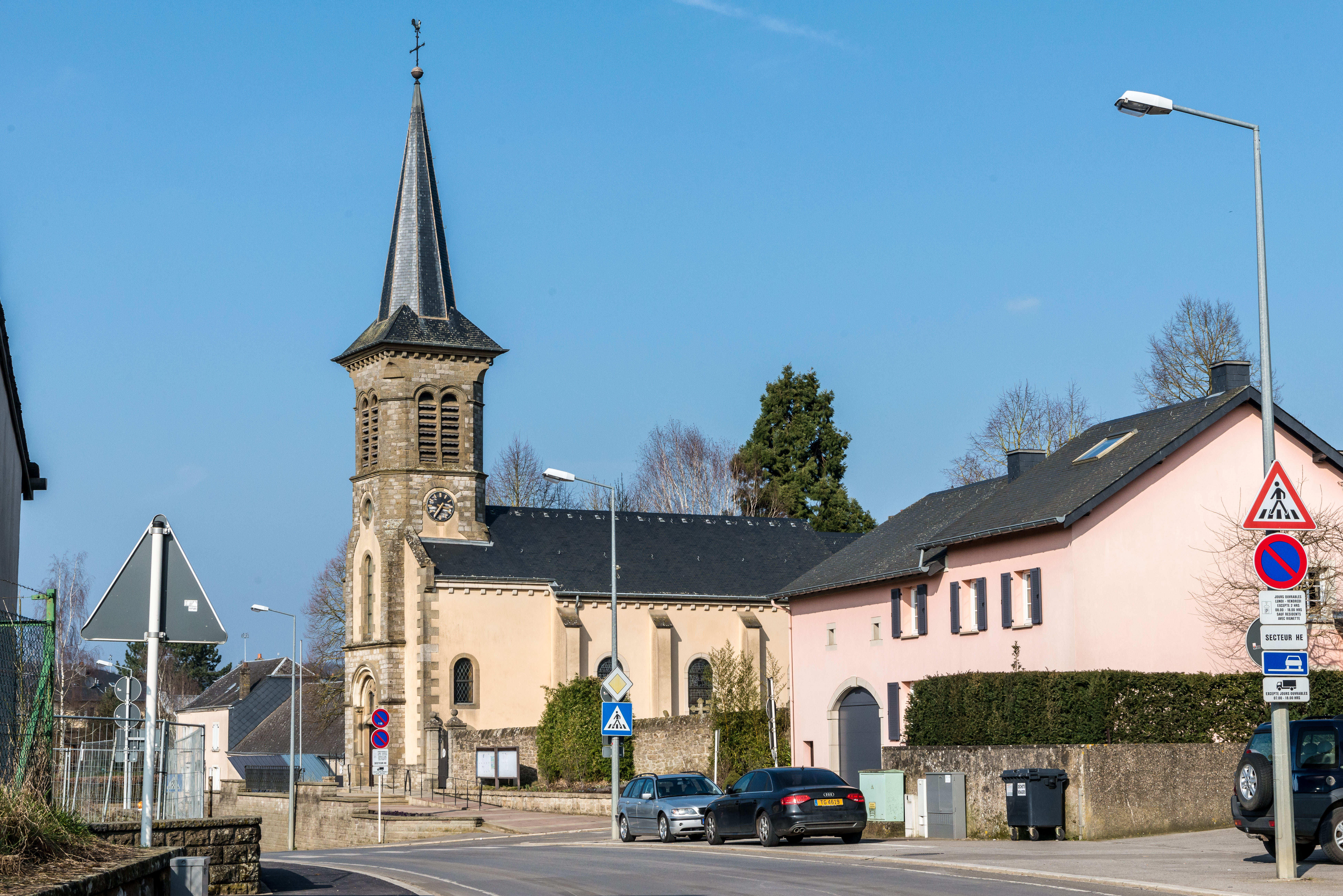 D'Fentenger Kierch.